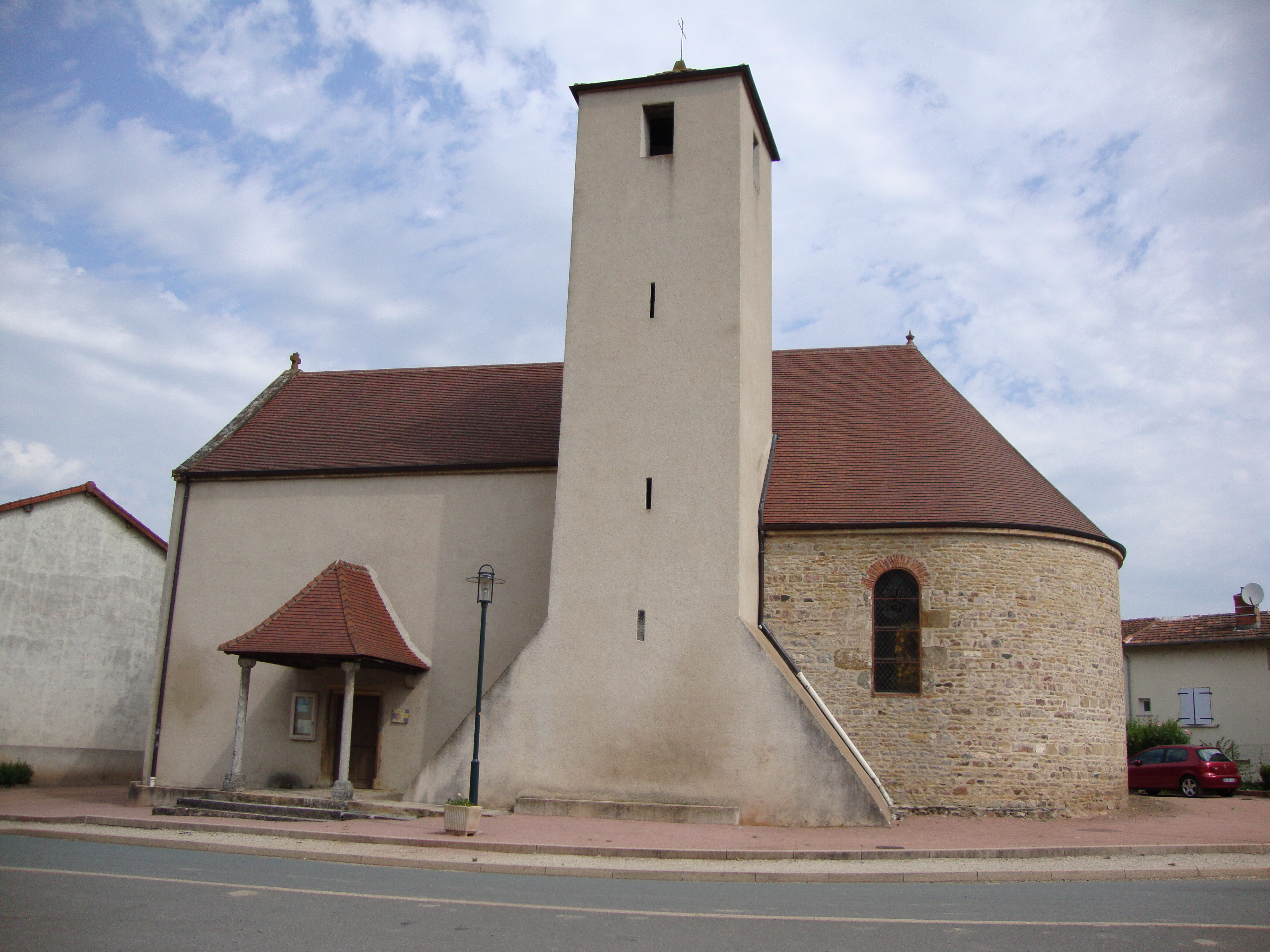 Ste Cécile (Saône-et-Loire, Fr) église extérieur